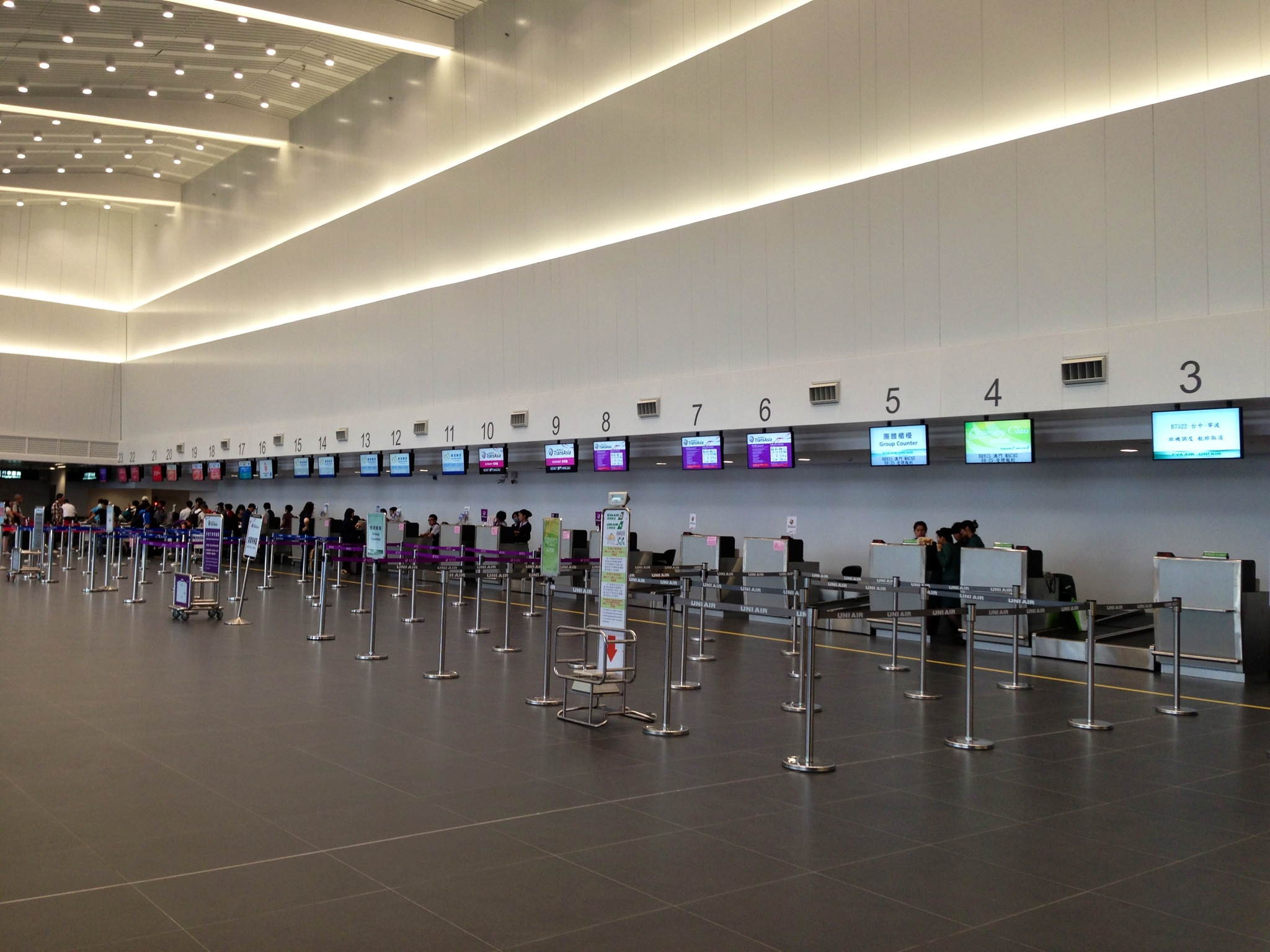 臺中航空站第二航廈大廳，共有23個櫃台